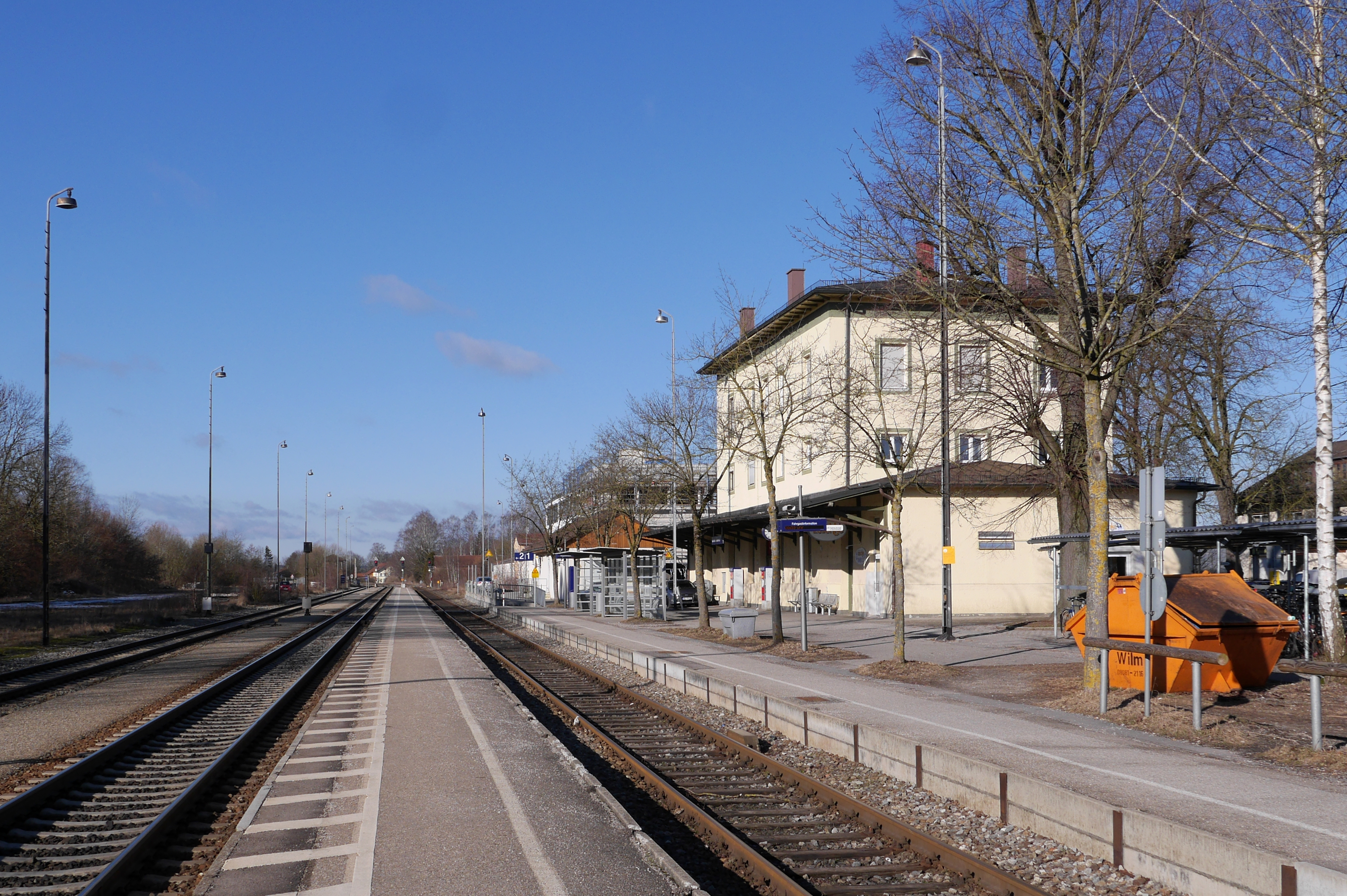 Bahnsteige in Dorfen Bahnhof, rechts das Empfangsgebäude, in der Mitte hinter den Wartehäuschen das Gebäude des elektronischen Stellwerks. Im Hintergrund sind die Ausfahrsignale nach Hörlkofen und der Bahnübergang der B 15, links davon das westliche Wärterstellwerk und rechts davon das westliche Wechselwärterhaus zu erkennen.